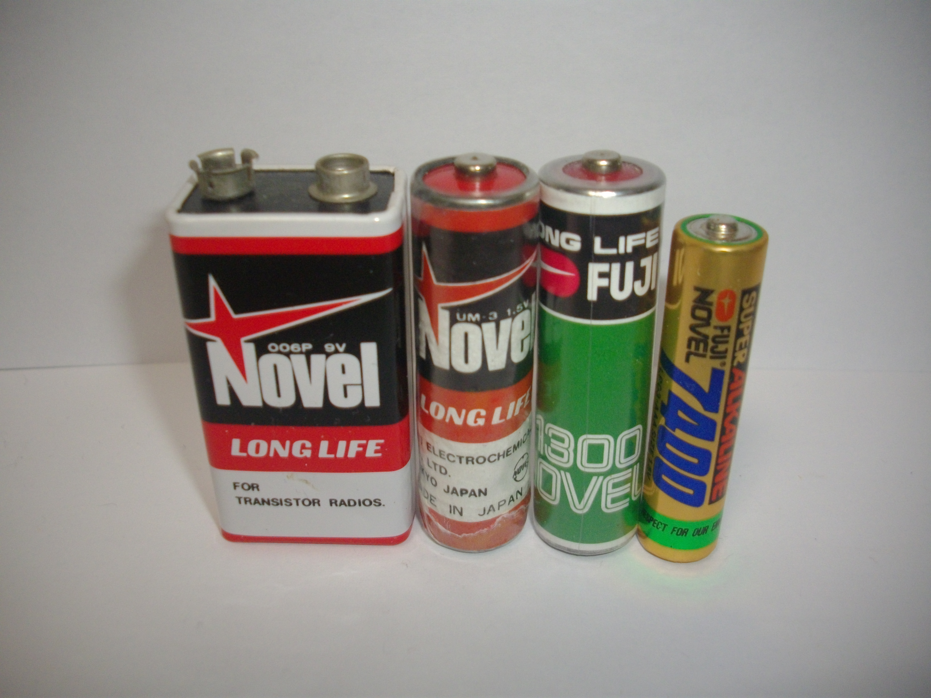 左からNOVEL S-006P（9V）、NOVEL R6（単3）、NOVEL 1300（単3の標準容量のマンガン電池）、NOVEL 7400（単4アルカリ電池）